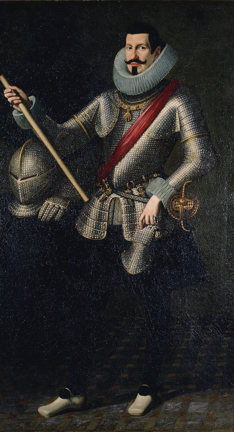 Pedro Téllez-Girón y Velasco, III Duque de Osuna. (1574-1624) Militar, noble y político. Realizado por Bartolomé González y Serrano retratista barroco que trabajó para la corte de Felipe III.